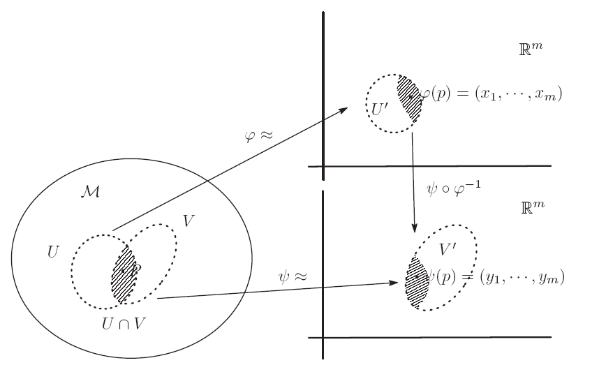 流形上的坐标转换。自作。